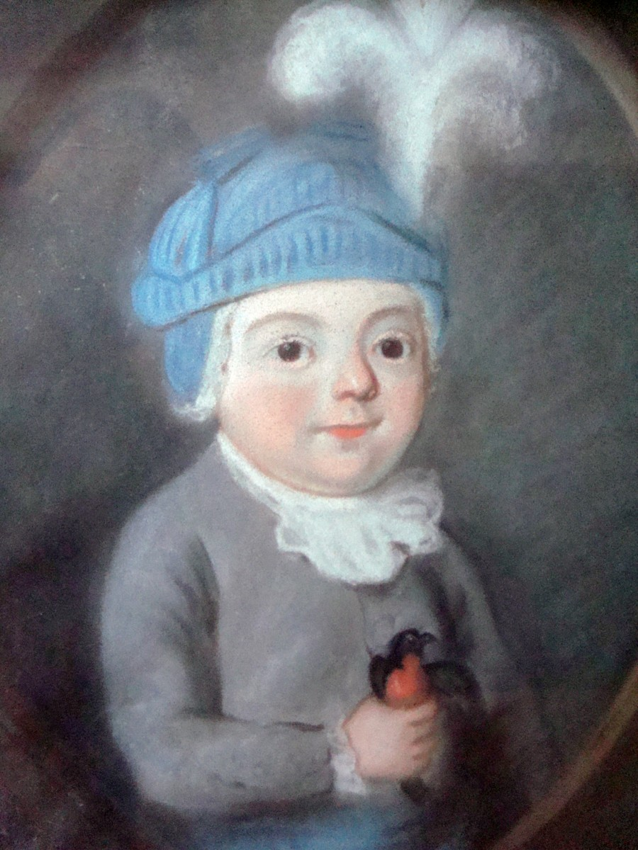 Portrait réputé représenter Antoine Clet enfant, pastel anonyme, vers 1710, dimensions 45,5 cm x 36,5 cm, musée Crozatier